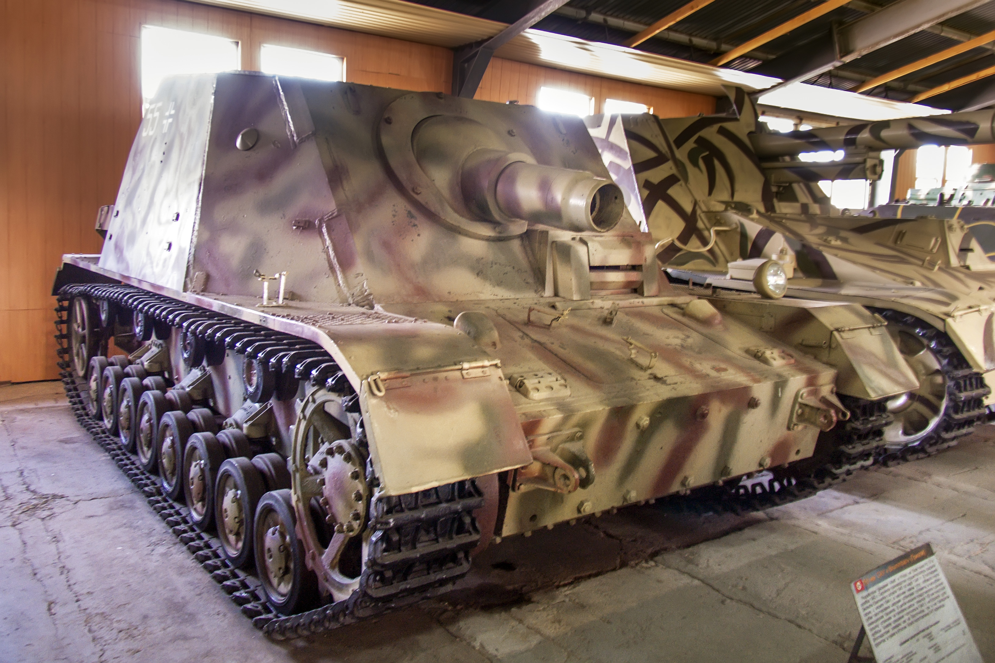 Самоходная установка Sturmpanzer IV "Бруммбар" (Sd.Kfz 166) в Центральном музее бронетанкового вооружения и техники в Кубинке.